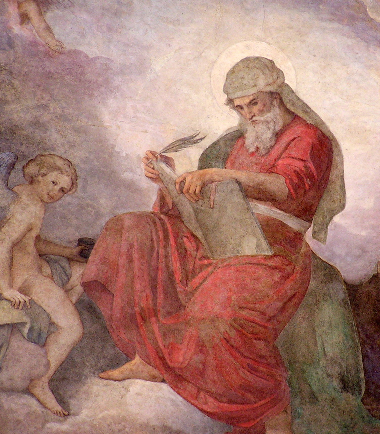 la foto raffigura un particolare di un affresco eseguito da Francesco Podesti sulle vele della cupola della Chiesa del SS. Sacramento, ad Ancona. Il dipinto rappresenta San Marco Evangelista. Nelle altre tre vele della cupola F. Podesti dipinse gli altri tre evangelisti. Il pittore al momento di eseguire questi affreschi aveva più di ottanta anni e perciò essi possono essere considerati come il suo testamento artistico.